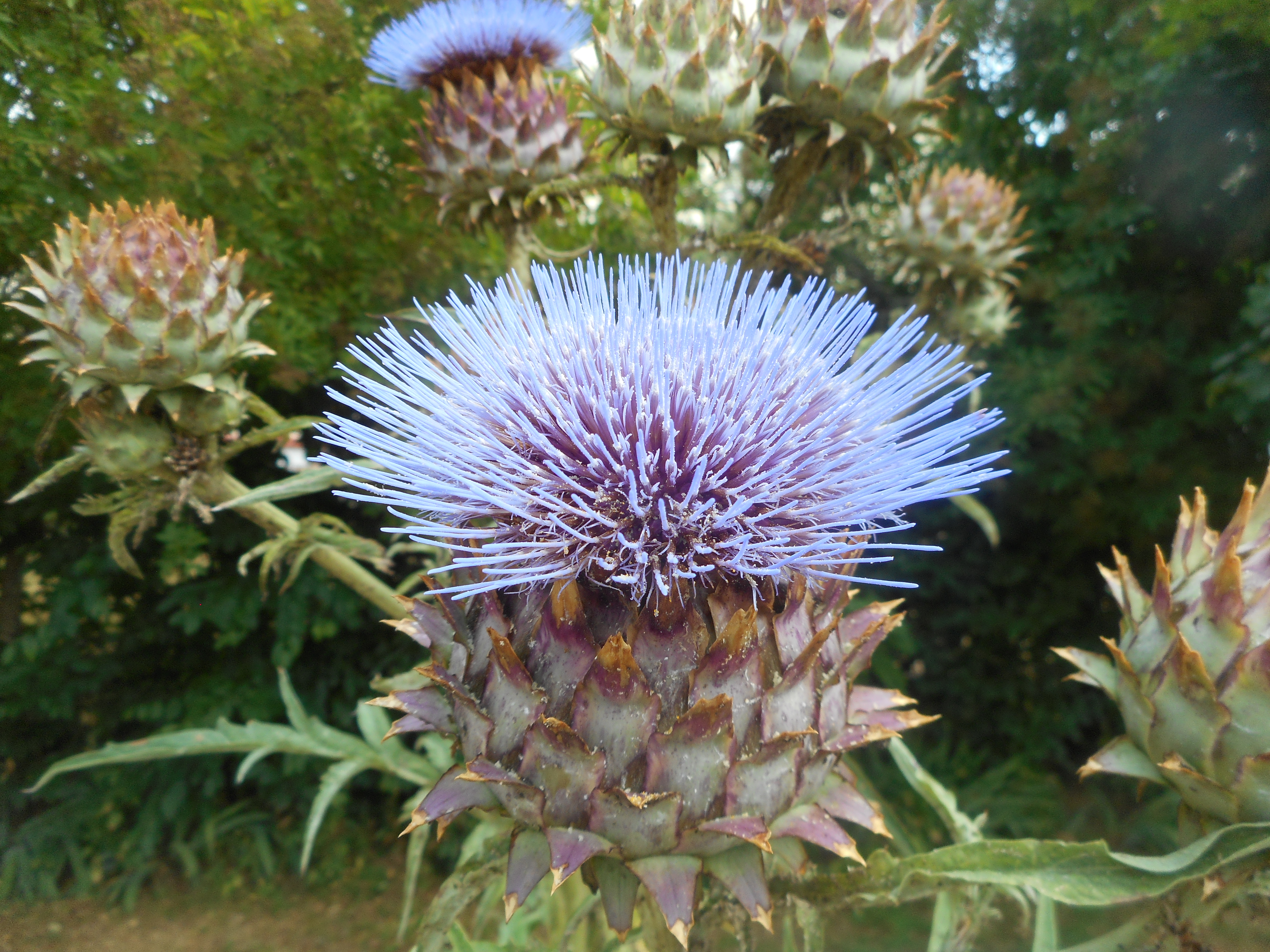 Fleur de cardon (Cynara cardunculus)